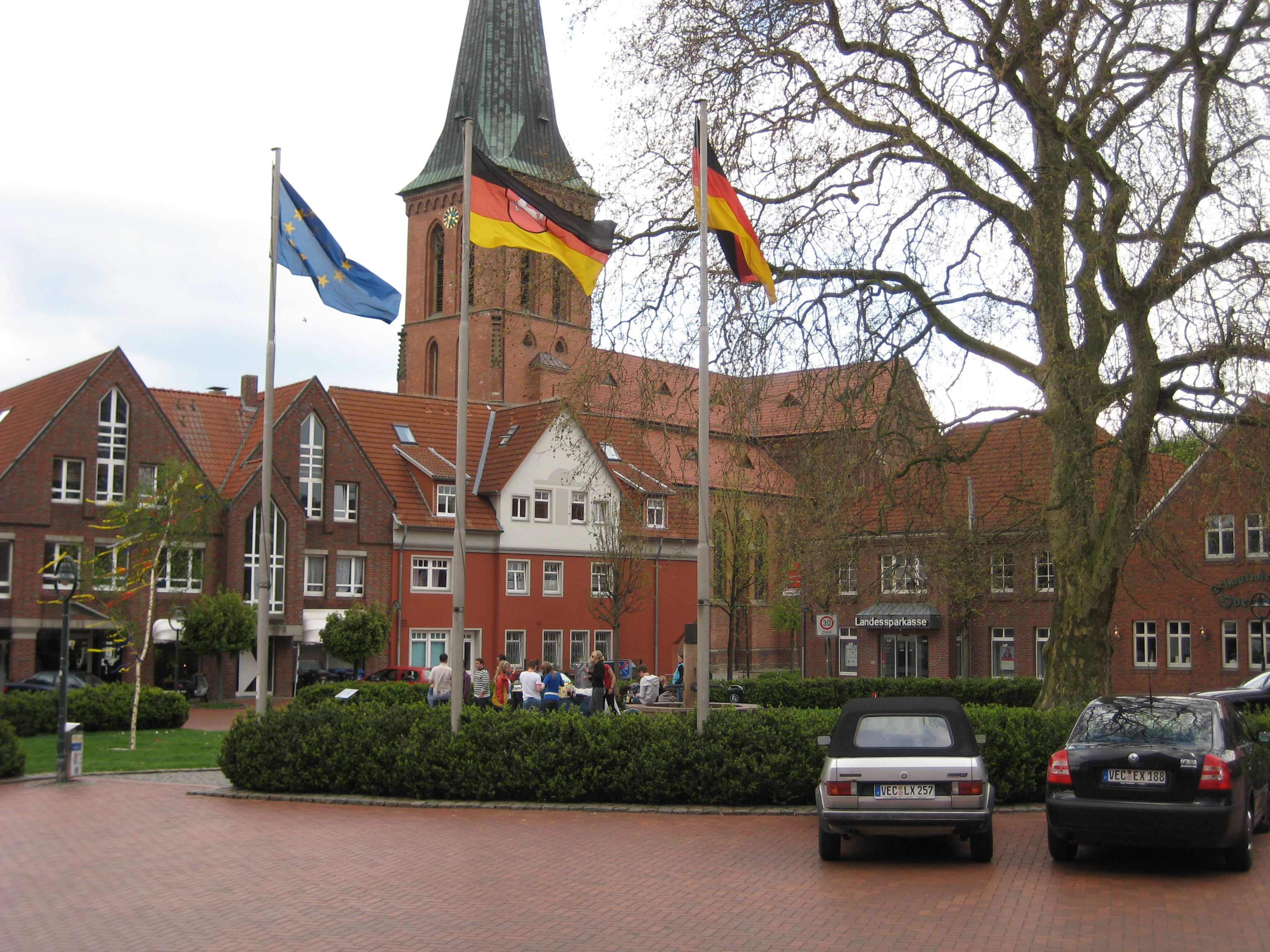 Steinfeld (Oldb.) Ortsmitte